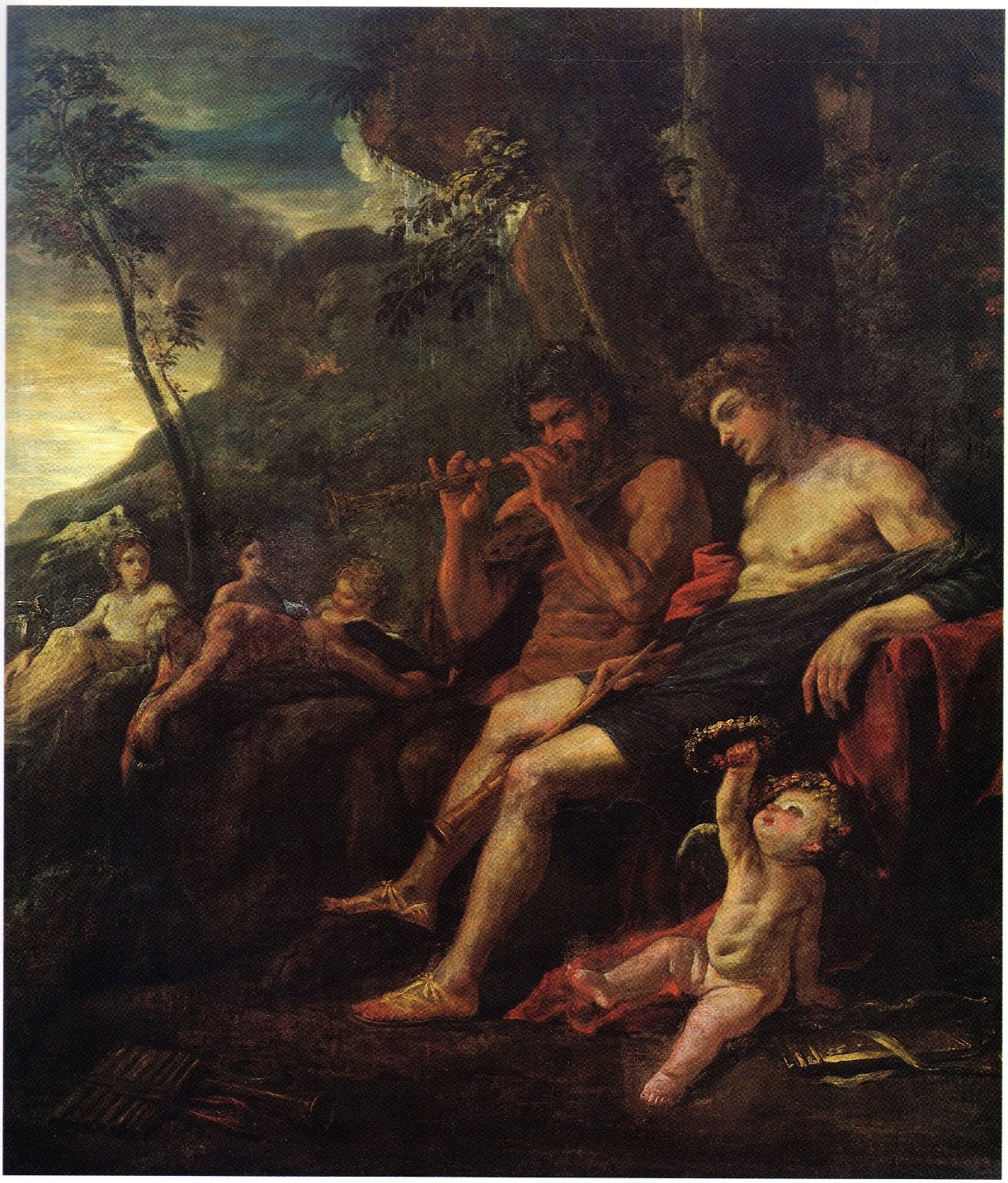 Tableau redécouvert par Pierre Rosenberg en 1969, acheté par le musée du Louvre puis rendu à ses propriétaires suite à une procédure judiciaire en 1978. Remis en vente et adjugé avec les frais pour 8 142 500 francs le 12 décembre 1988